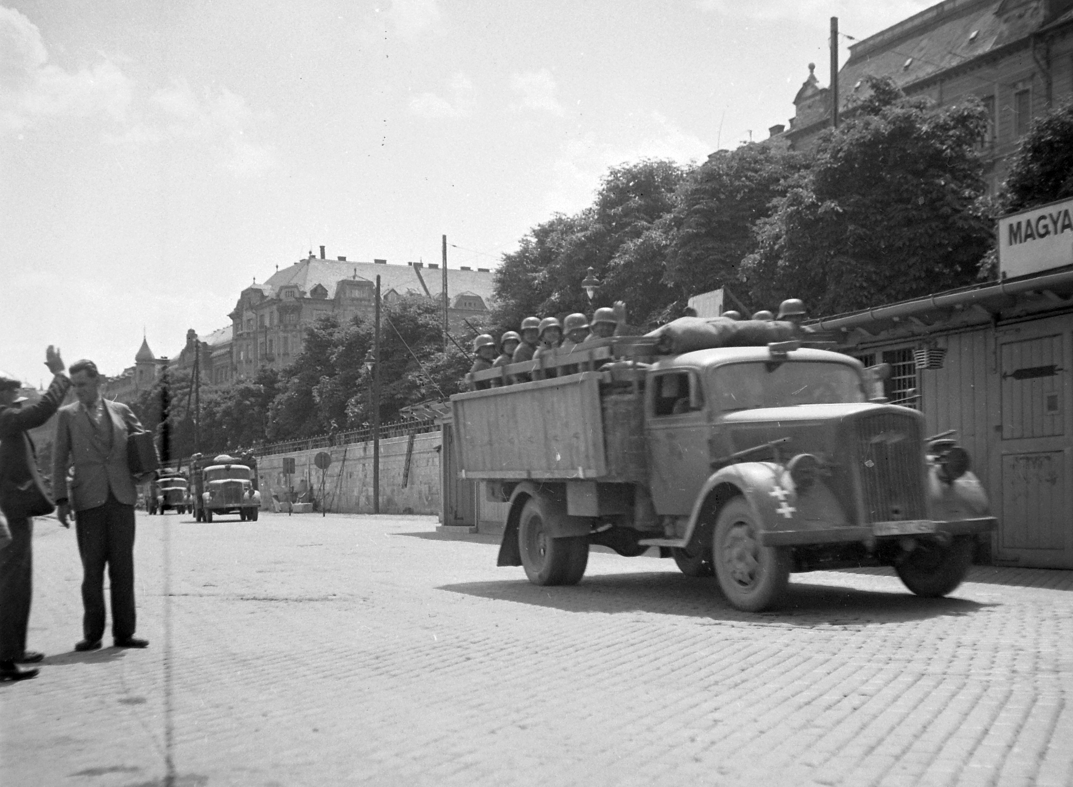 budai alsó rakpart a Bem (Pálffy) térnél. Location: Hungary, Budapest II. Tags: Opel-brand, commercial vehicle, military, street view, genre painting, second World War, Gerrman brand, Budapest Title: budai alsó rakpart a Bem (Pálffy) térnél.